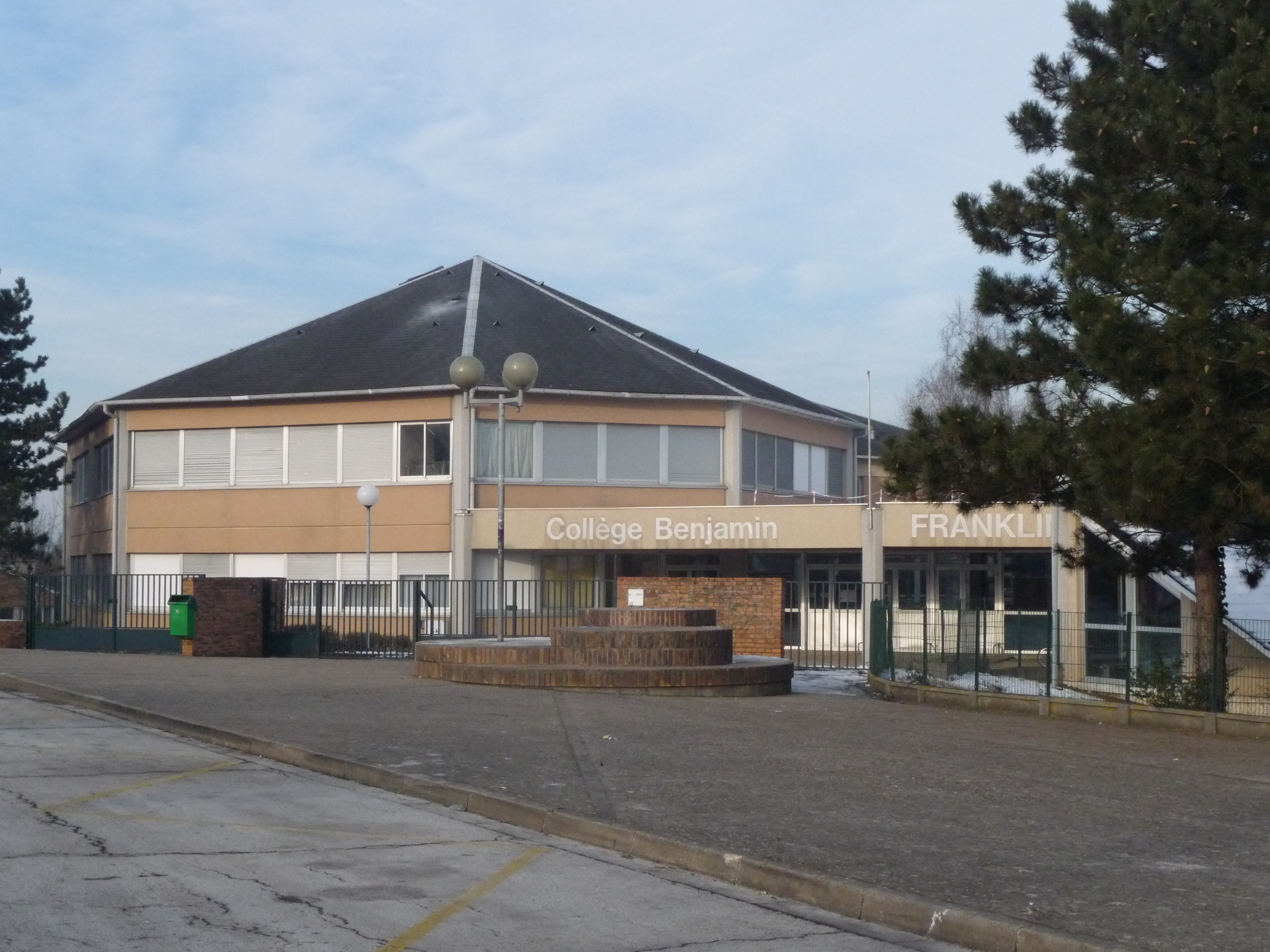 Le collège Benjamin Franklin à Épône (Yvelines, FRance)